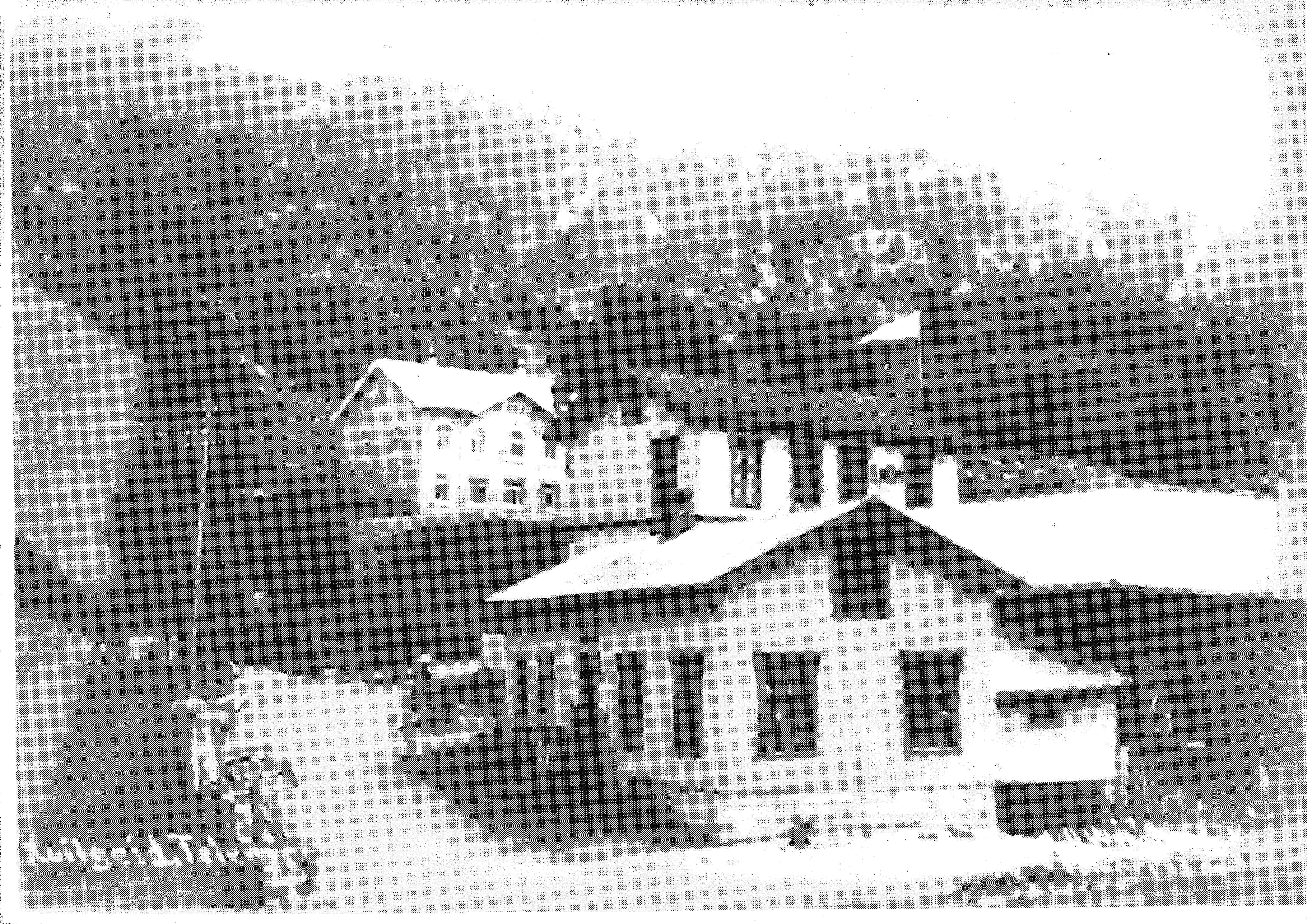 Kviteseidbyen, 1921. Banken i bakgrunnen